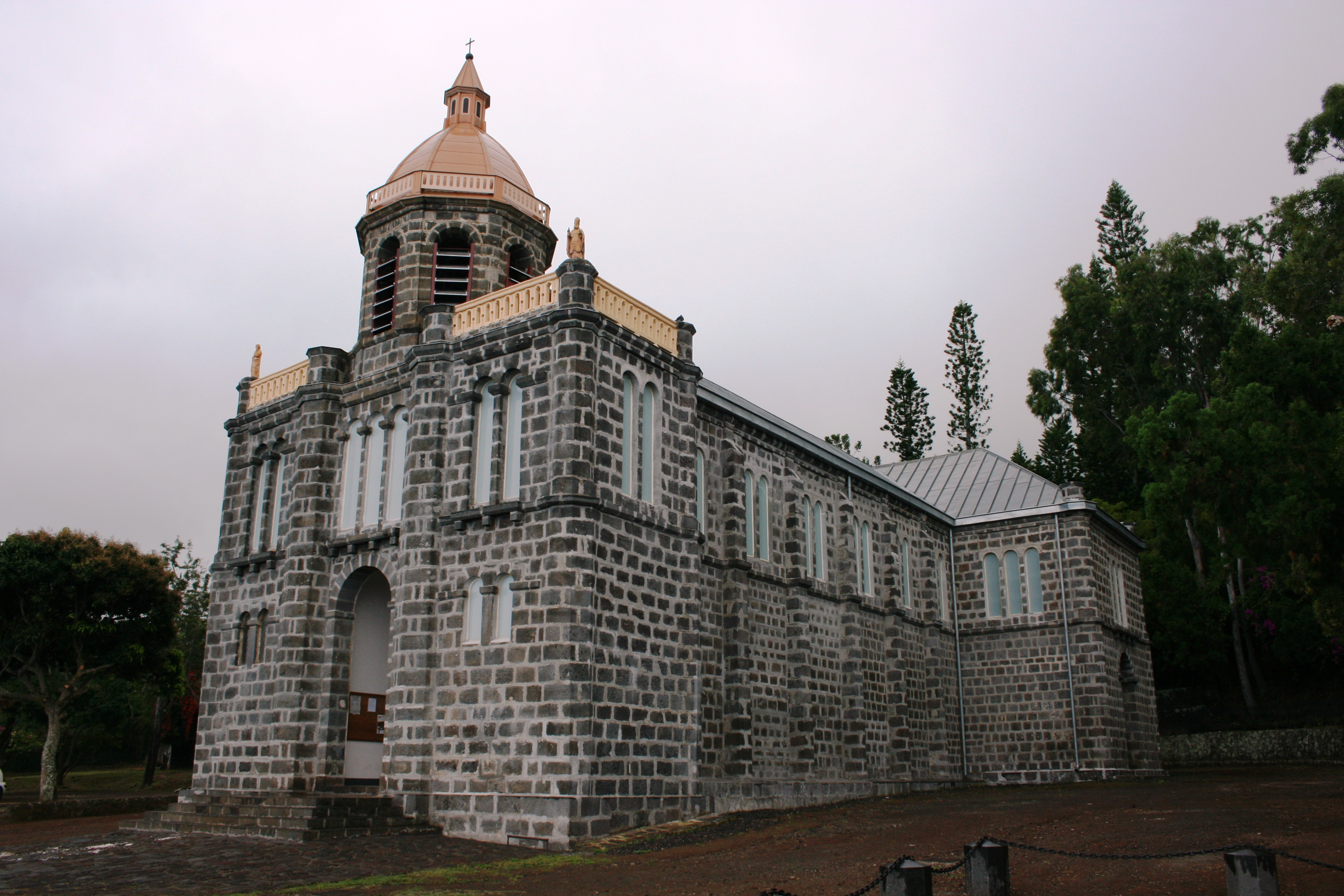 Façade de l'église du Sacré-Cœur, à Saint-Leu de La Réunion.